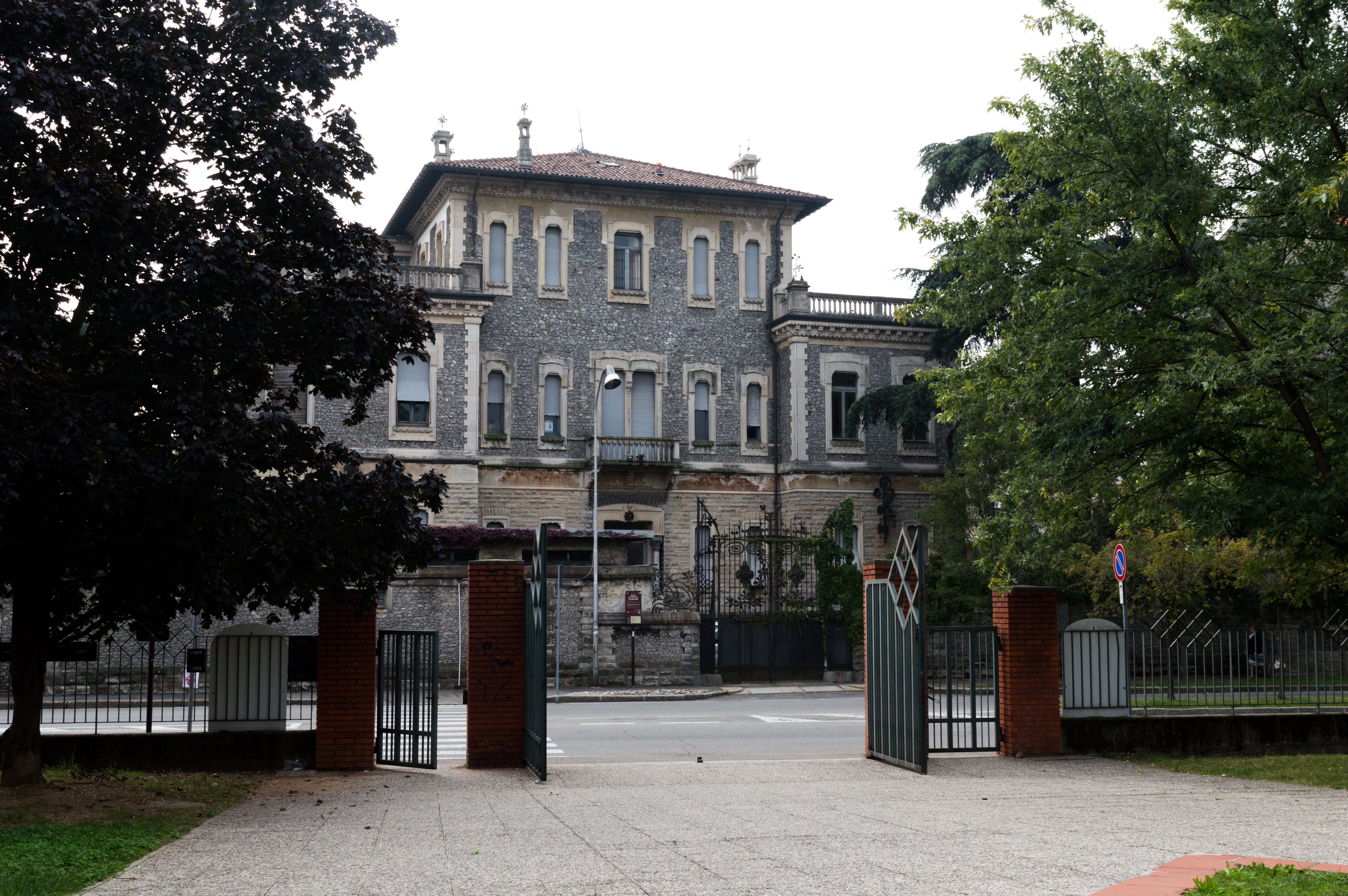 Villa Ottolini-Tovaglieri This is a photo of a monument which is part of cultural heritage of Italy.